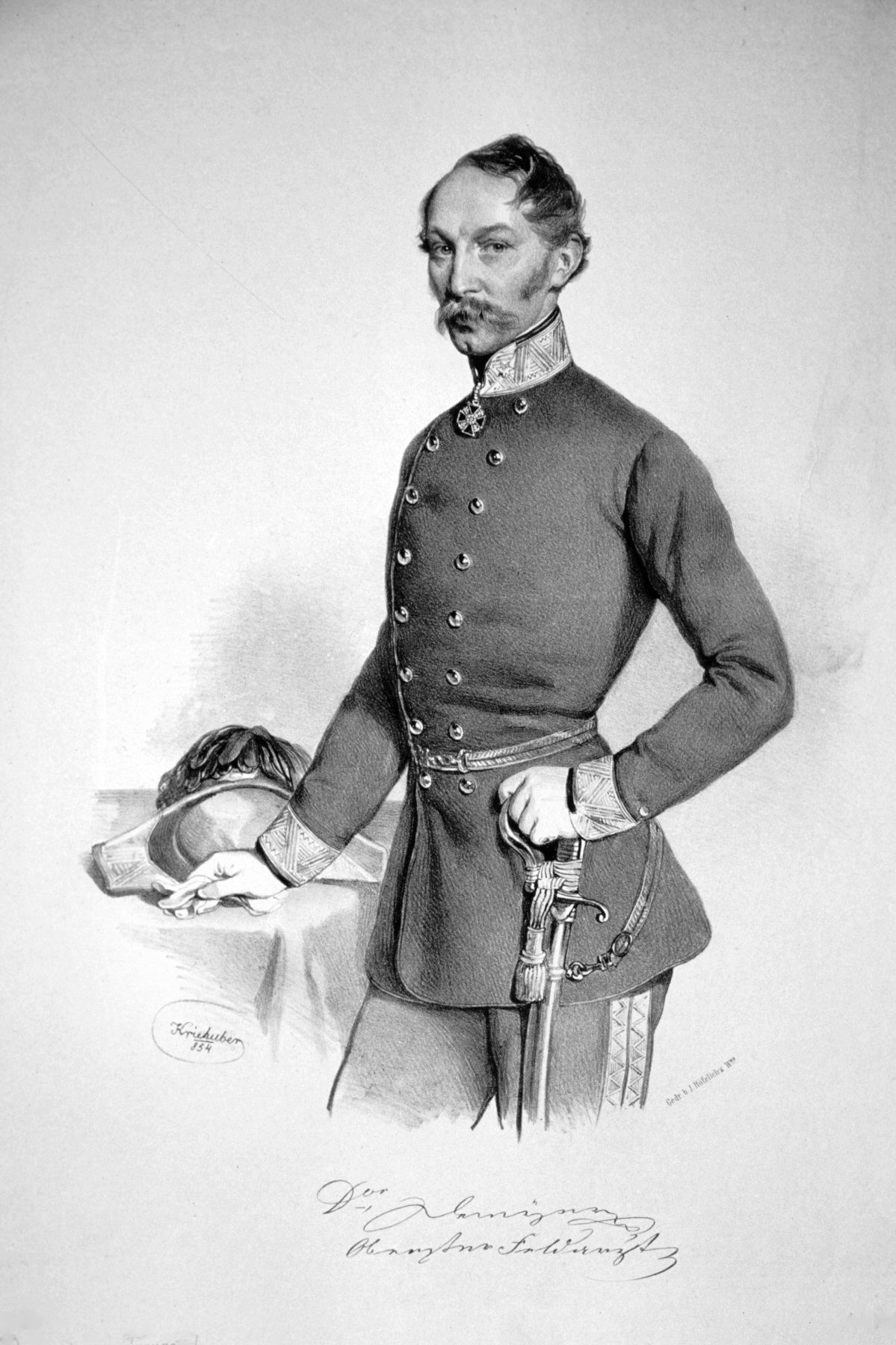 Johann Traugott Dreyer von der Iller (1804-1871), k. k. Generalstabsarzt. Lithographie von Josef Kriehuber, 1854.